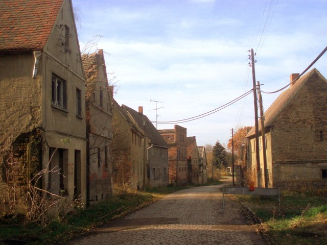 Dorfstraße in Großgrimma vor dem Abriss im November 2006 Urheber: selbst erstellt